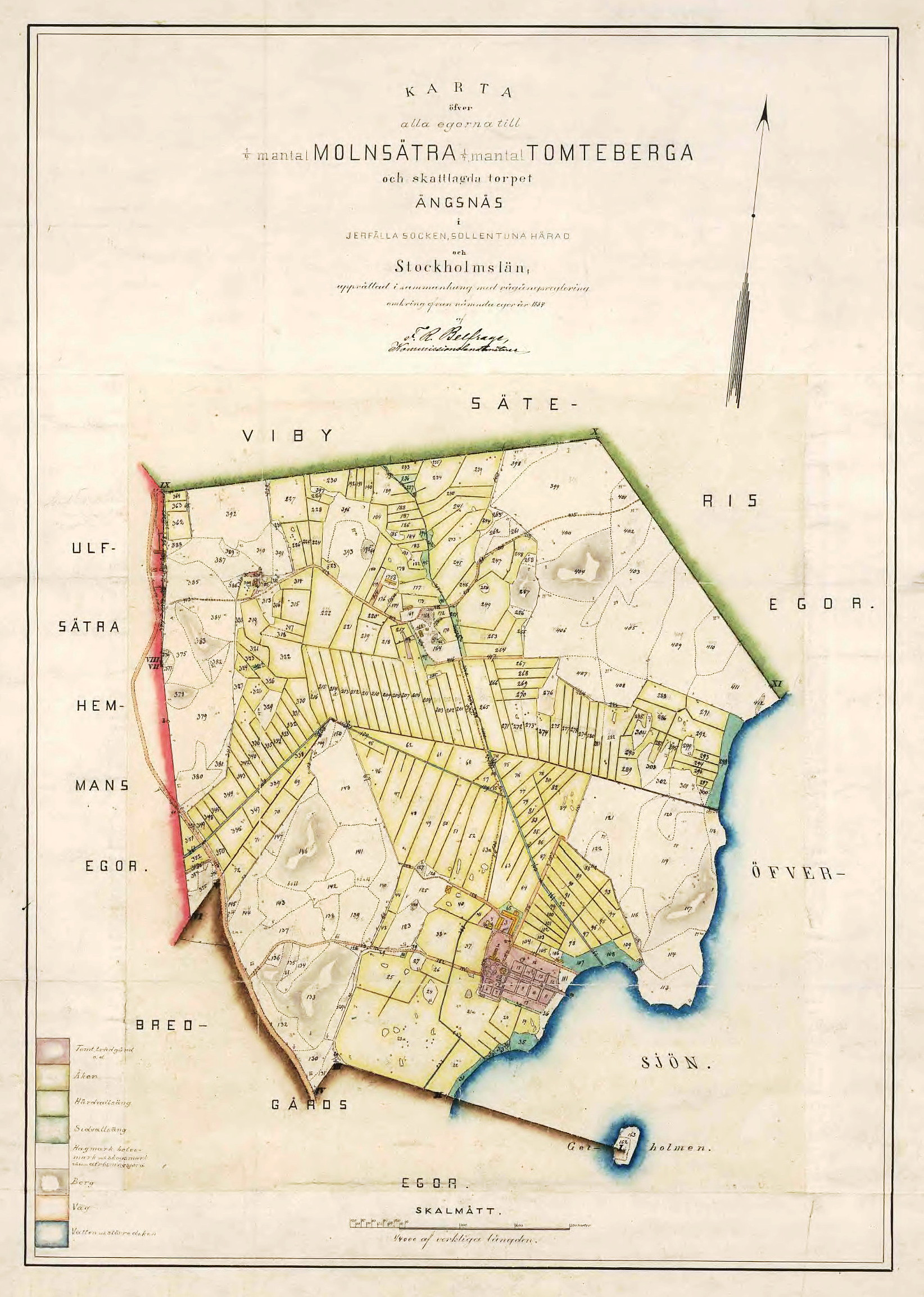 Karta över Molnsätras och Tomtebergas ägor